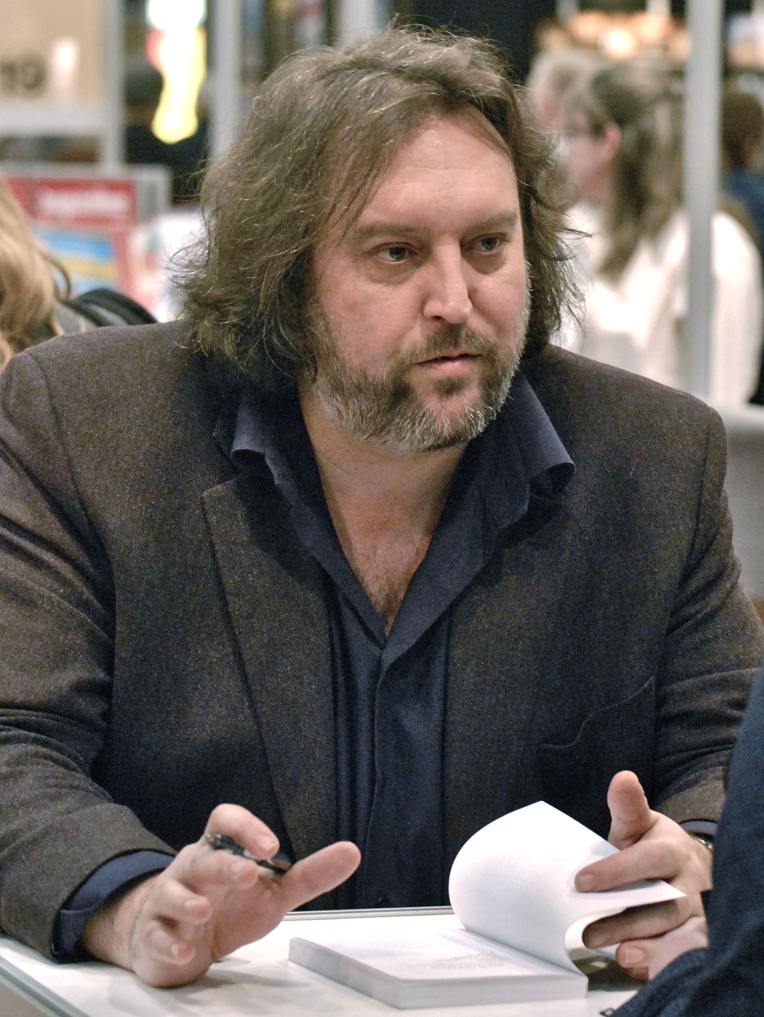 Bryan Perro, lors du Salon international du livre de Québec 2012